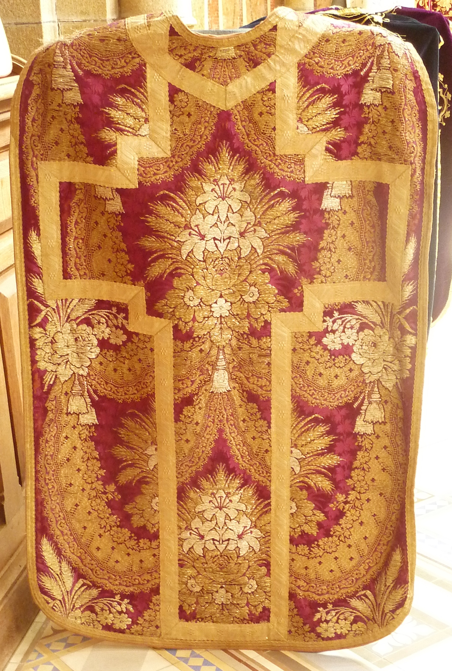 Plouigneau : chasuble de la paroisse Saint-Ignace (brocard de soie violette lamé or et argent avec motifs en dentelle ; galons dorés ; XIXe siècle) (exposition chapelle Saint-Vincent à Pont-Croix en 2017).